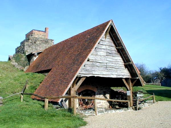 Musée régional de la poterie